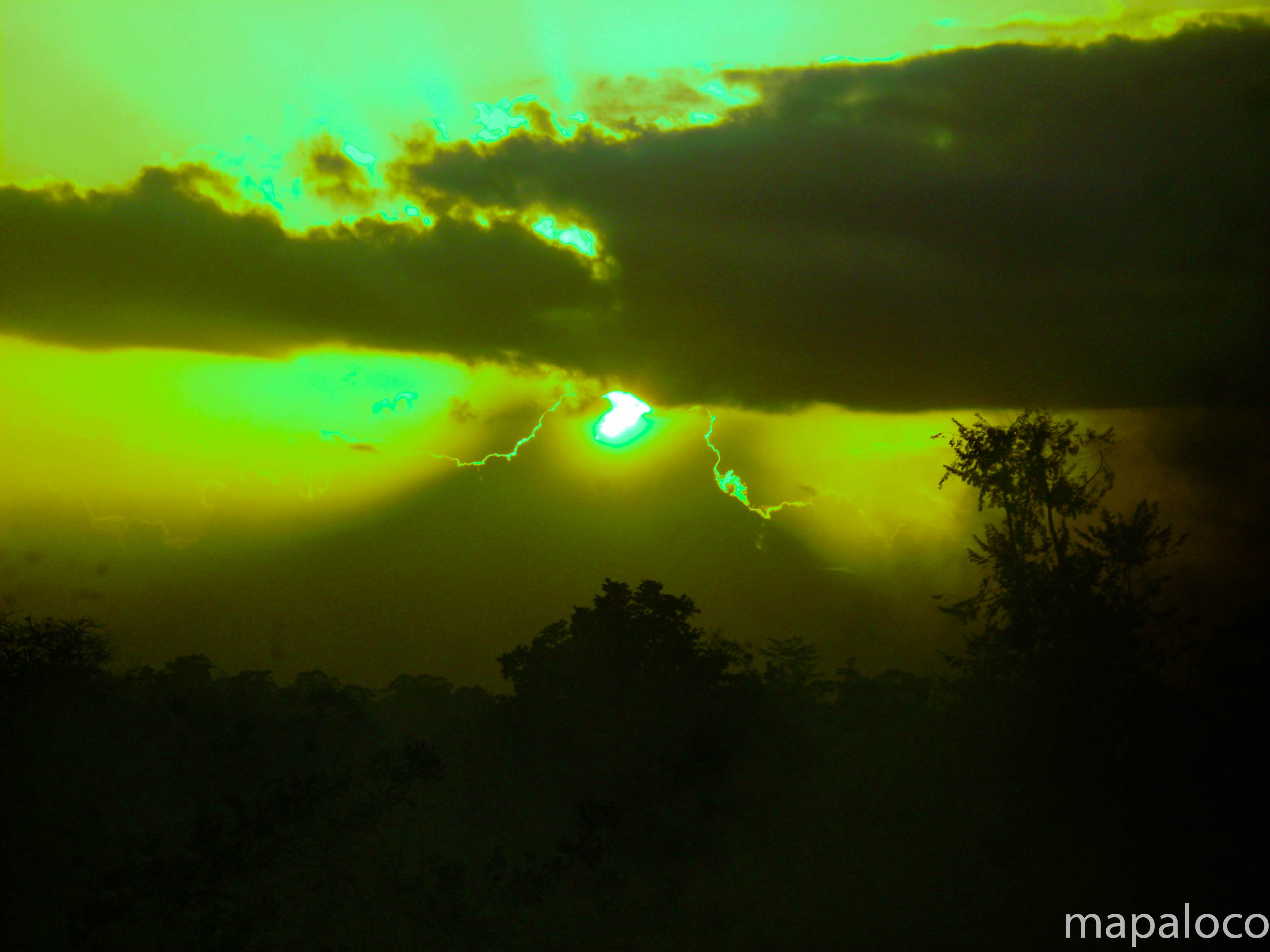 Atardecer, vista desde el Aserrío Las Minas, Palmera, RAAN, Nic.